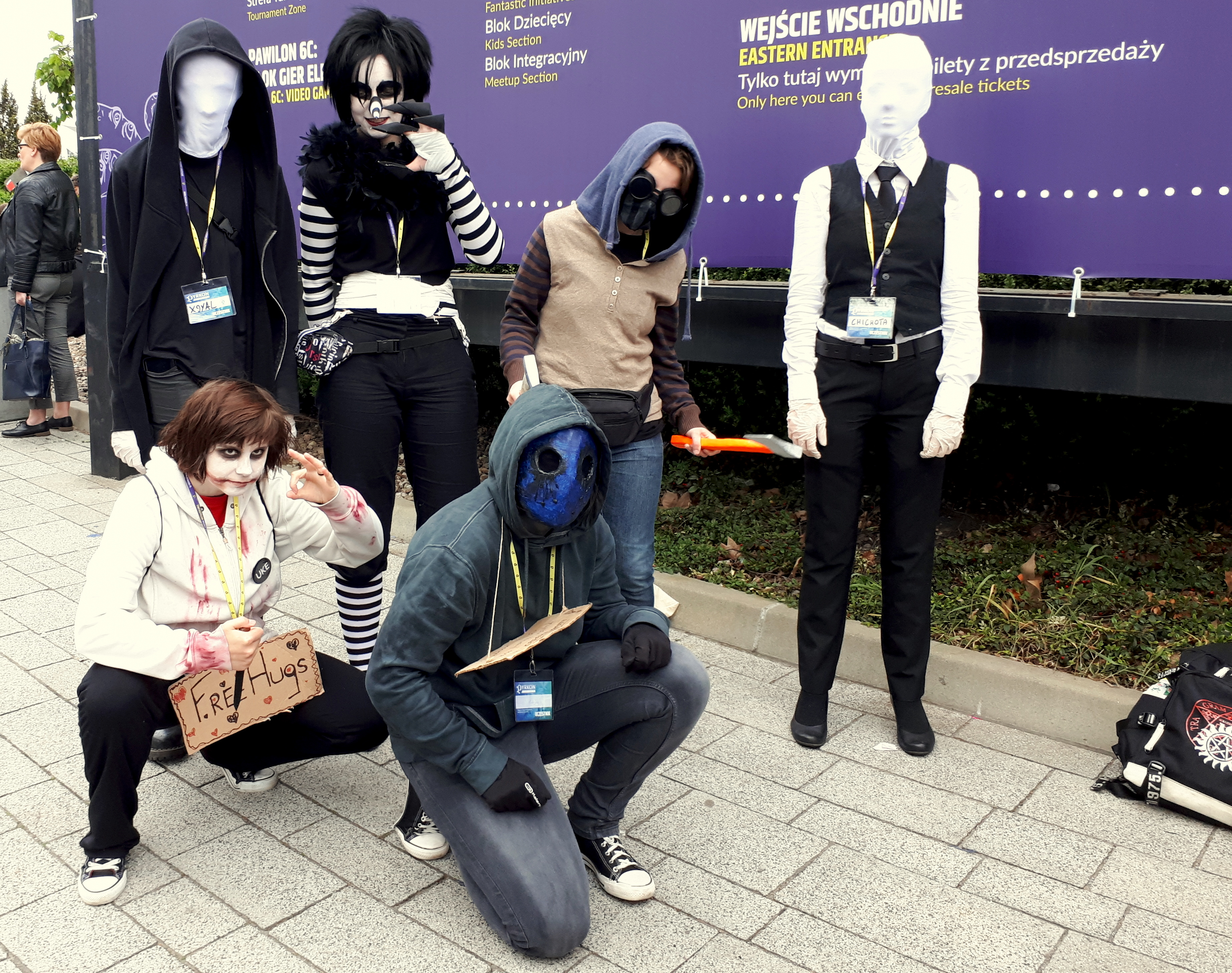 Uczestnicy konwentu Pyrkon 2019 - cosplaye: Slenderman, Jeff the Killer, Eyeless Jack, Ticci Toby, Laughing Jack